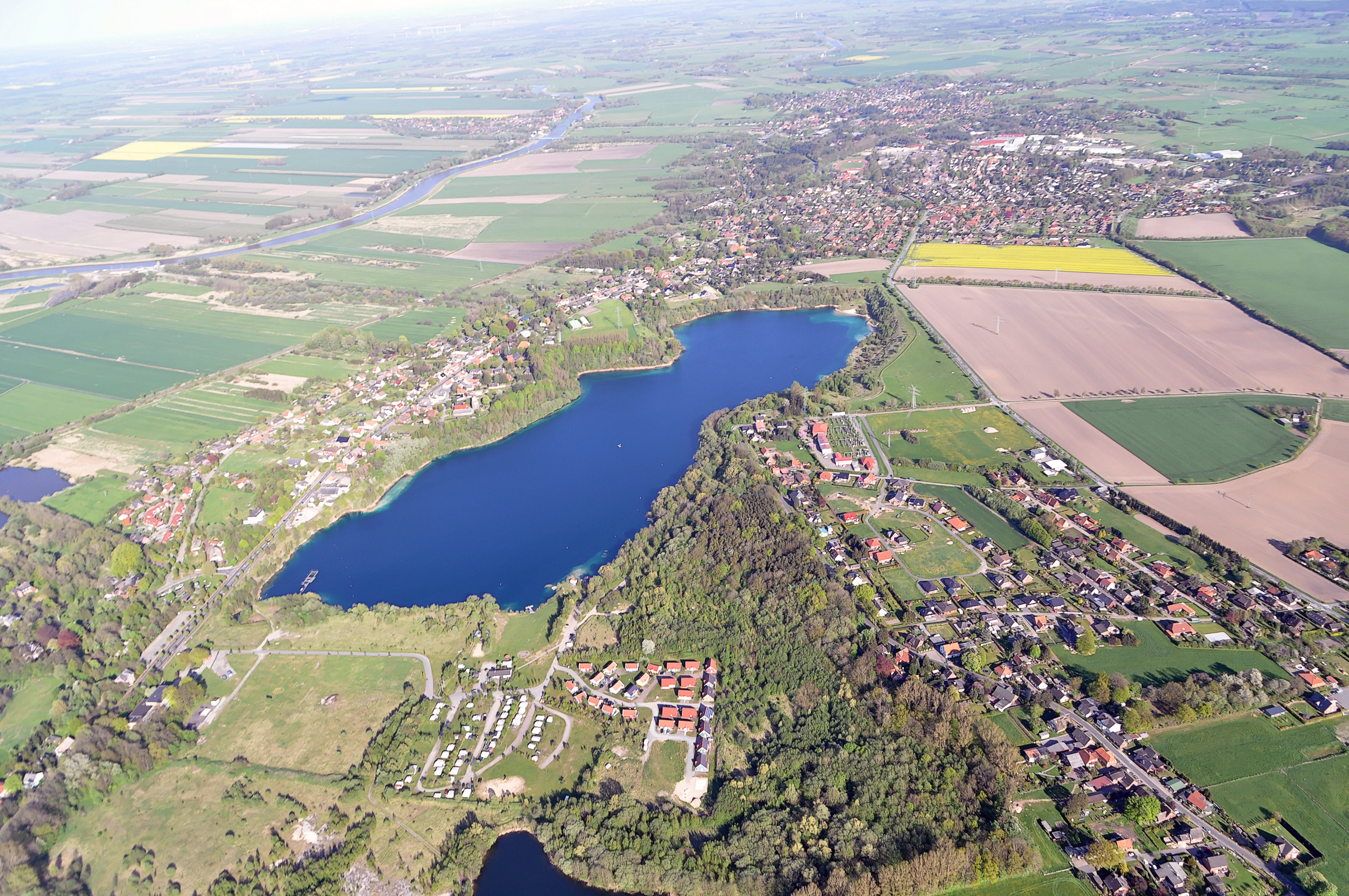 Luftbilder von der Nordseeküste 2012-05